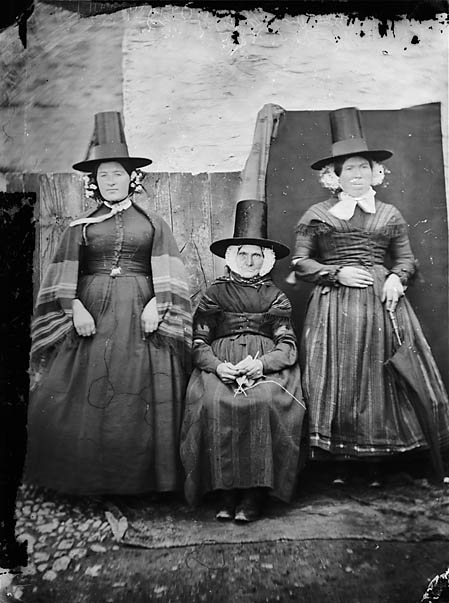 Teitl Cymraeg/Welsh title: Fy mam (yn eistedd), Shan y Lliwdy a Morwyn Bontfaen Ffotograffydd/Photographer: John Thomas (1838-1905) Nodyn/Note: Two women standing with Jane Thomas (mother of John Thomas), who is sitting between them. Dyddiad/Date: [1867] Cyfrwng/Medium: Negydd gwydr / Glass negative Maint/Dimensions: 110 x 185 mm. Cyfeiriad/Reference: jtrr063 (jth02773) Rhif cofnod / Record no.: 3363713 Rhagor o wybodaeth am gasgliad John Thomas yn Llyfrgell Genedlaethol Cymru More information about the John Thomas Collection at the National Library of Wales